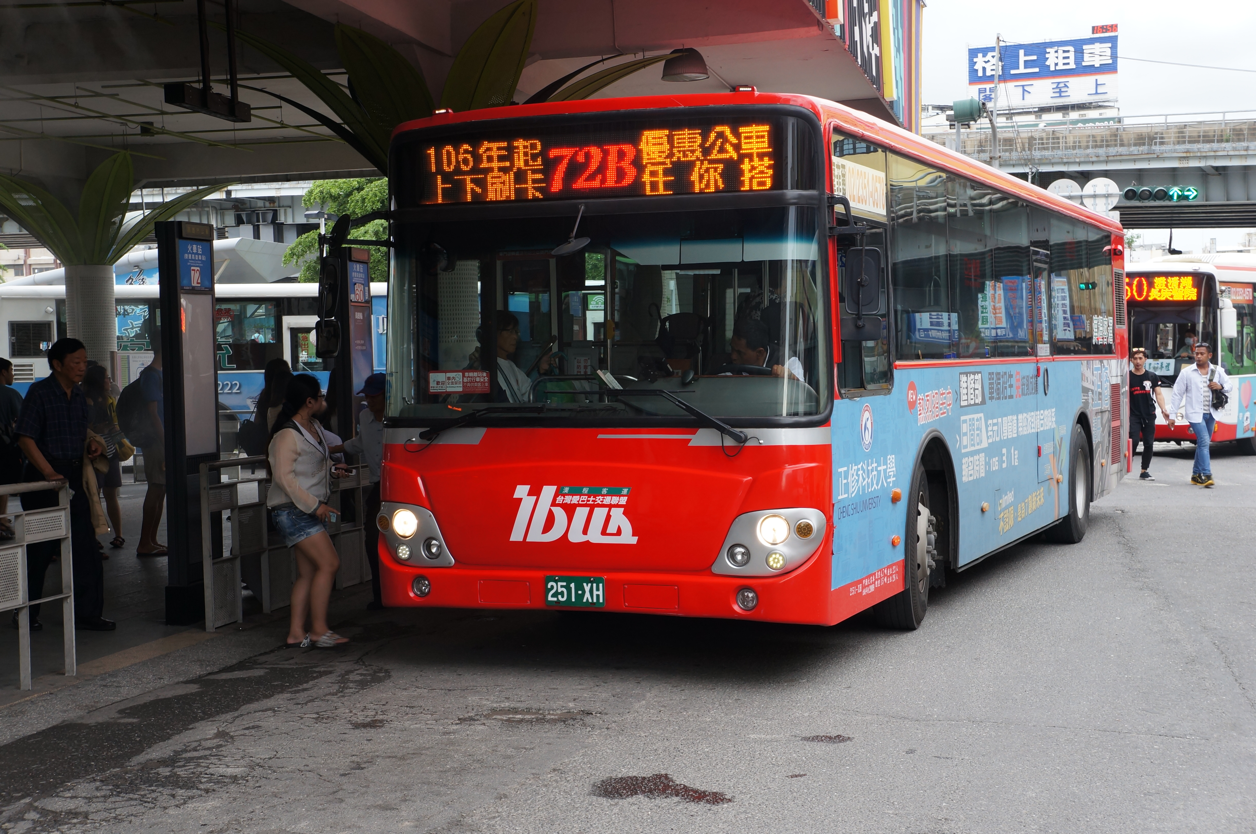 中文（台灣）: 漢程客運大客車251-XH，行駛高雄市公車72B線，停靠高雄公車站，左側車身貼正修科技大學車體廣告。